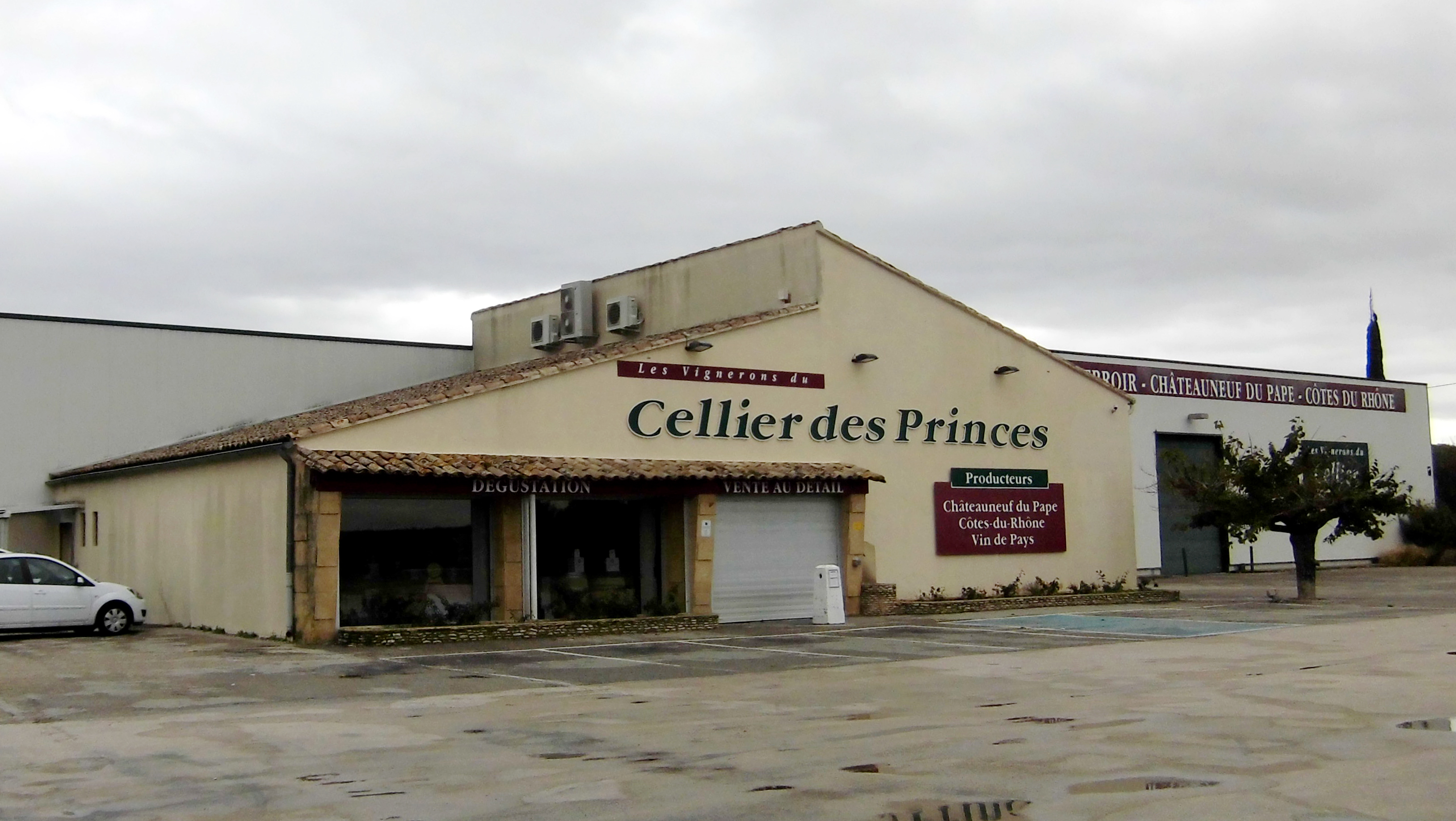 Caveau du Cellier des Princes à Courthézon